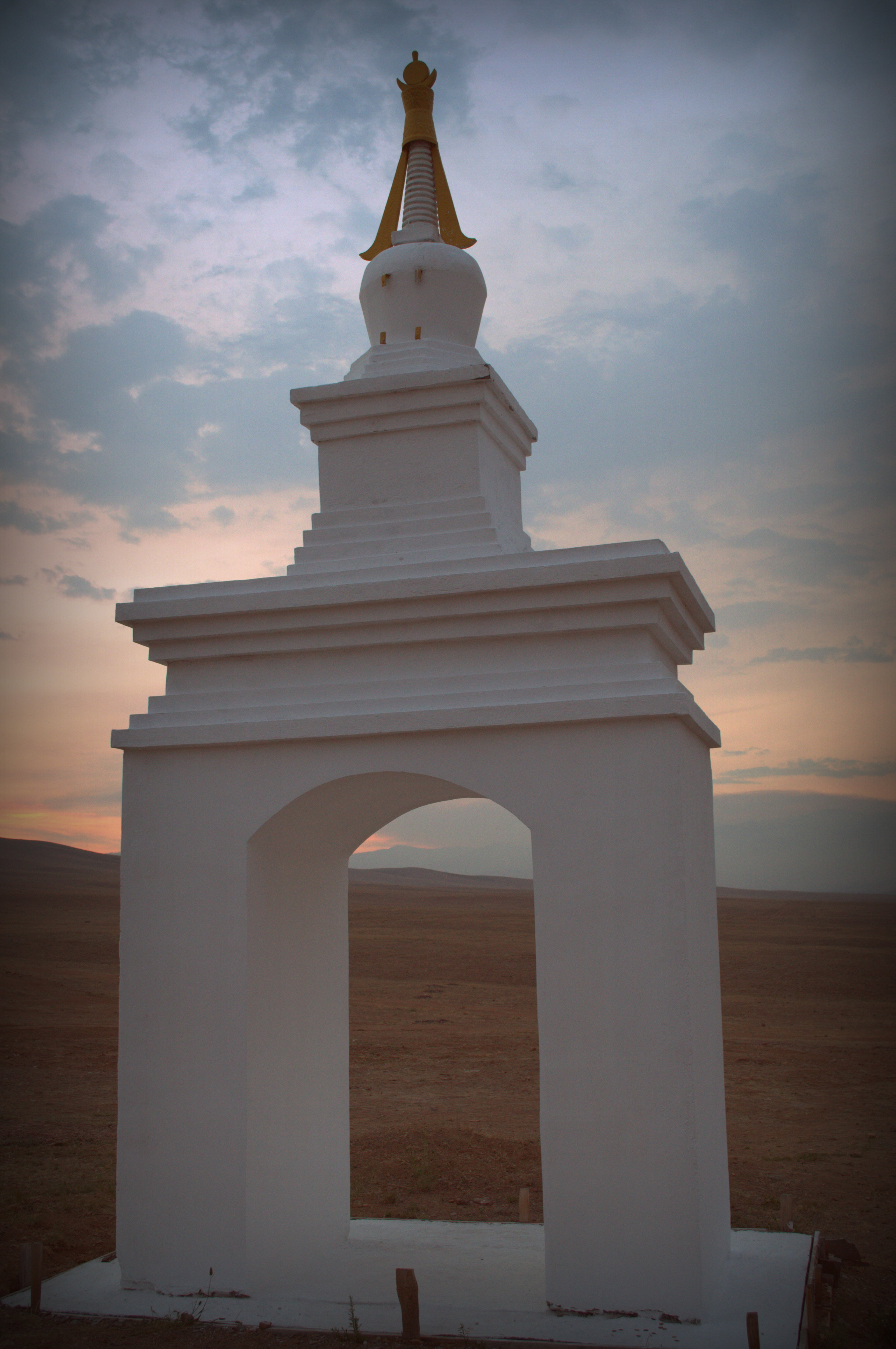 Ацагатский дацан. Заиграевский район, Бурятия, Сибирь